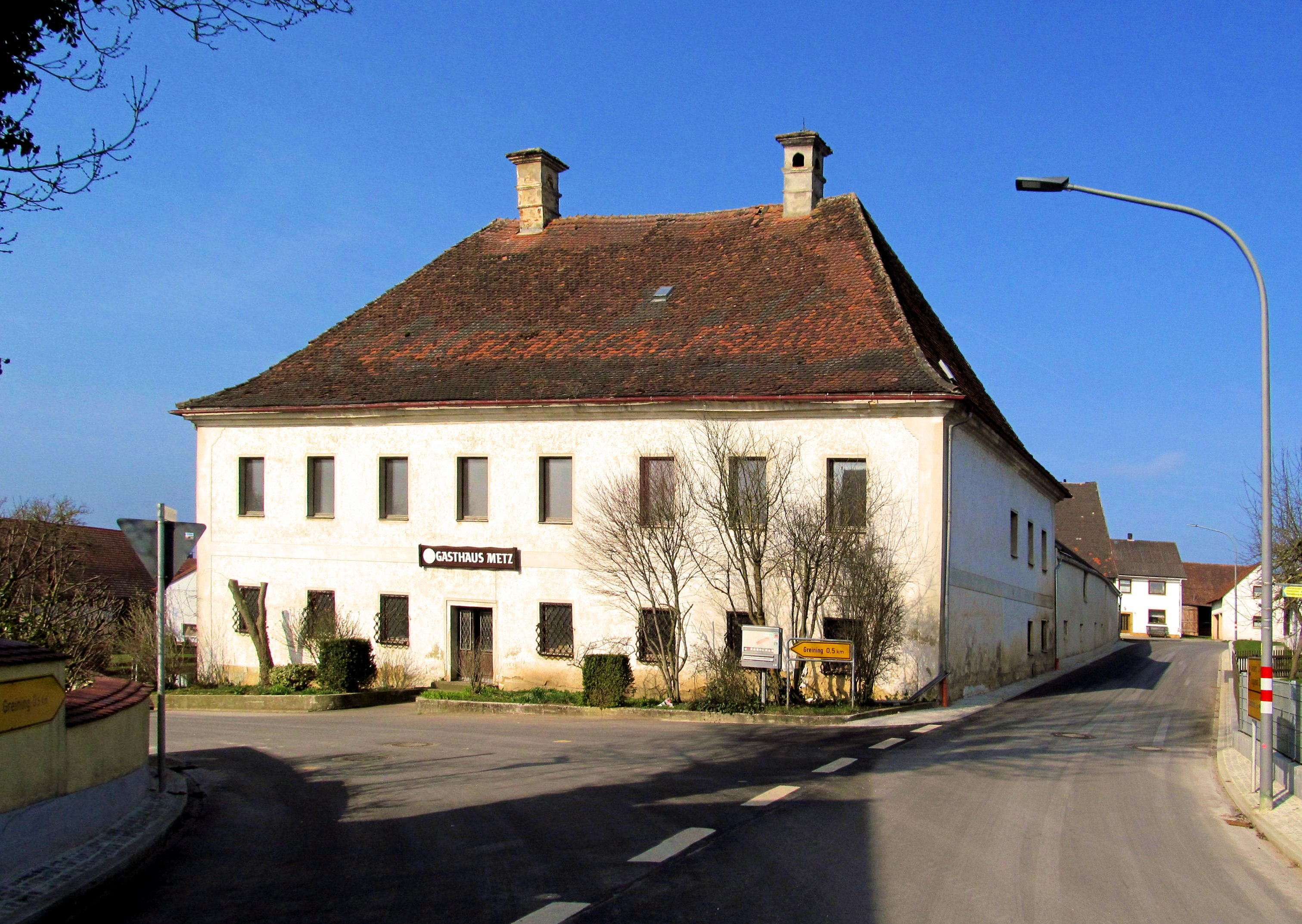 Winbuch: Schloss (ehem. Landsassengut)